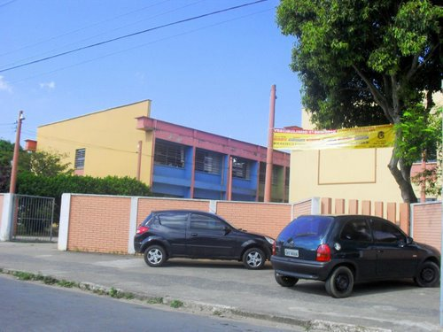 ETEC Suzano-SP